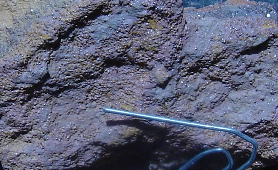 Oolithes ferrugineuses de Lorraine.Photographie du 17/06/05 réalisée par Marcot.Statut GFDL. Marcot